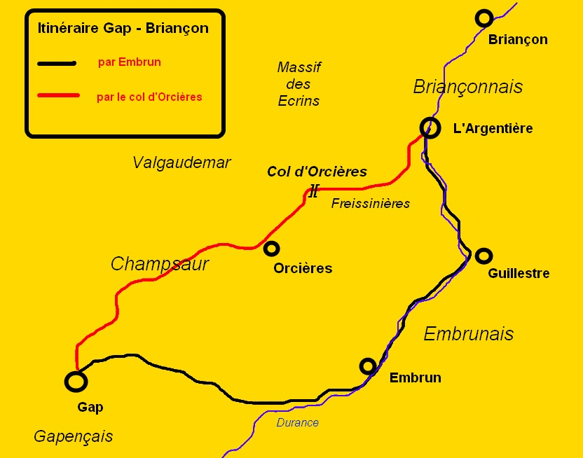 Les deux itinéraires pedestres possibles entre Gap et Briançon